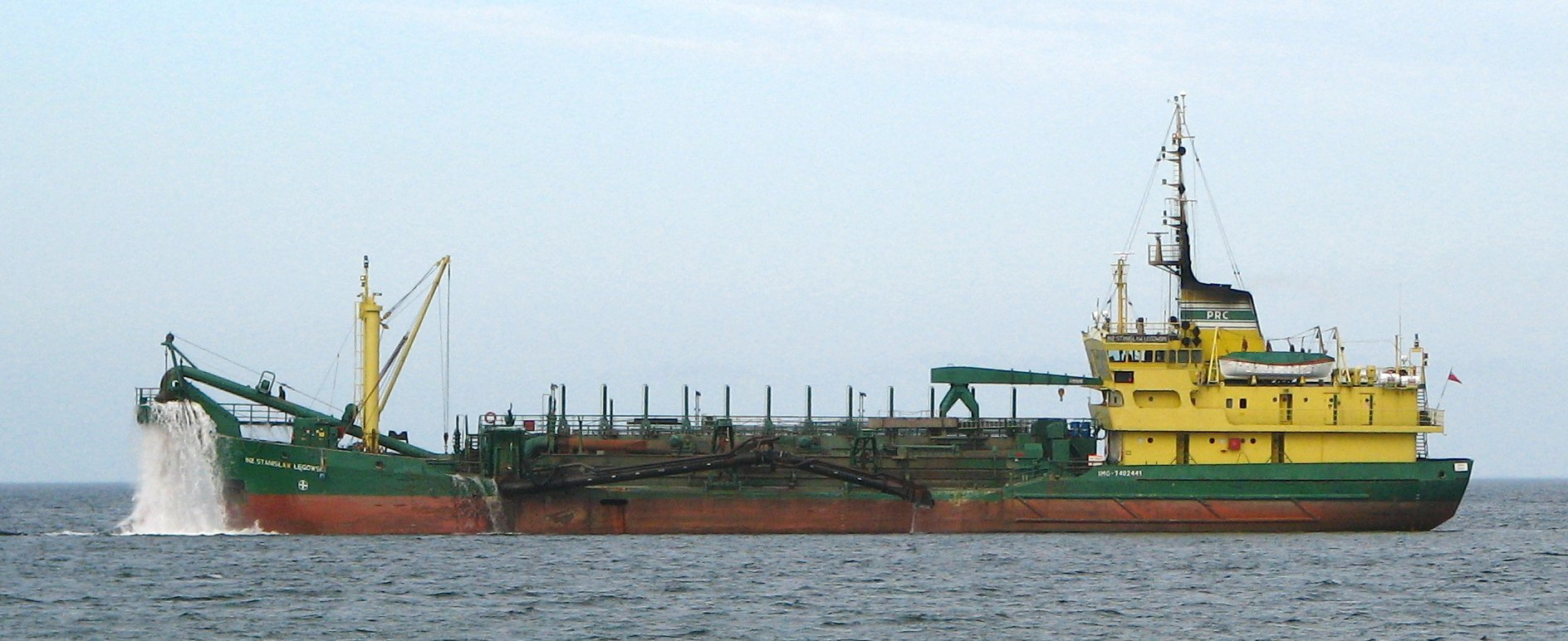 Polish hopper dredger "Inż. Stanisław Łęgowski" near the beach in Gdańsk-Przymorze.